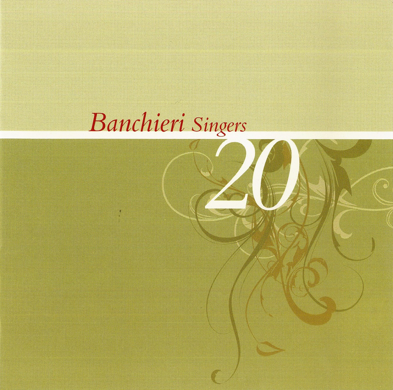 A Banchieri Singers 20 éves jubileumi albuma